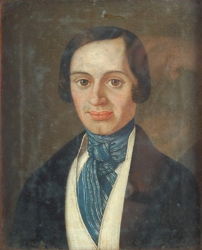 Josef Jaroslav Langer (1806 - 1846), Český novinář a básník.